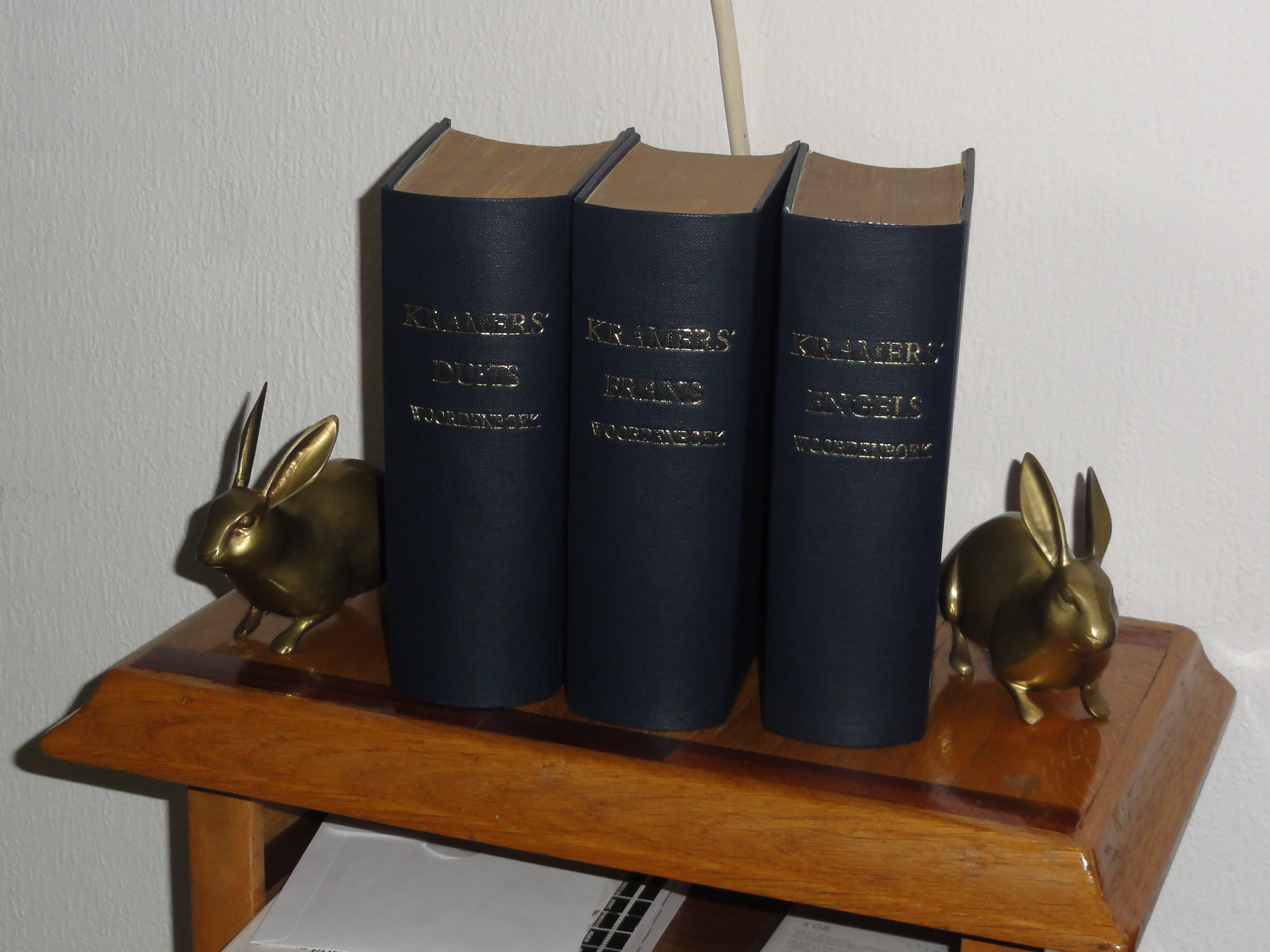 Boekbindclub Dukenburg Z25 voltooid reparatiebindwerk